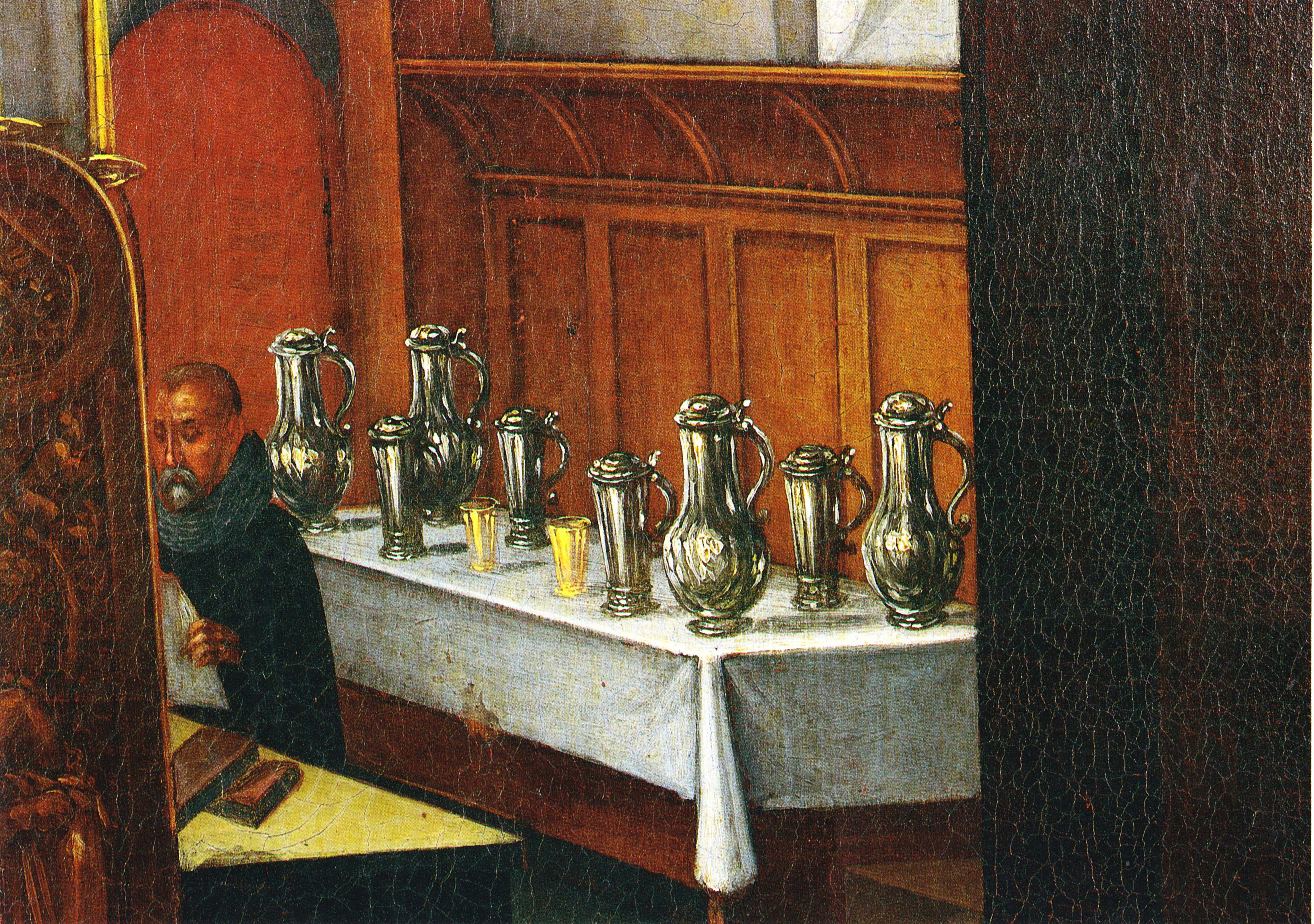 Aufstellung (eines Teils ?) des Lübecker Ratssilbers, Detail aus dem Gemälde Sitzung des Obergerichts im Audienzsaal des Lübecker Rathauses des Hans von Hemssen, 1625